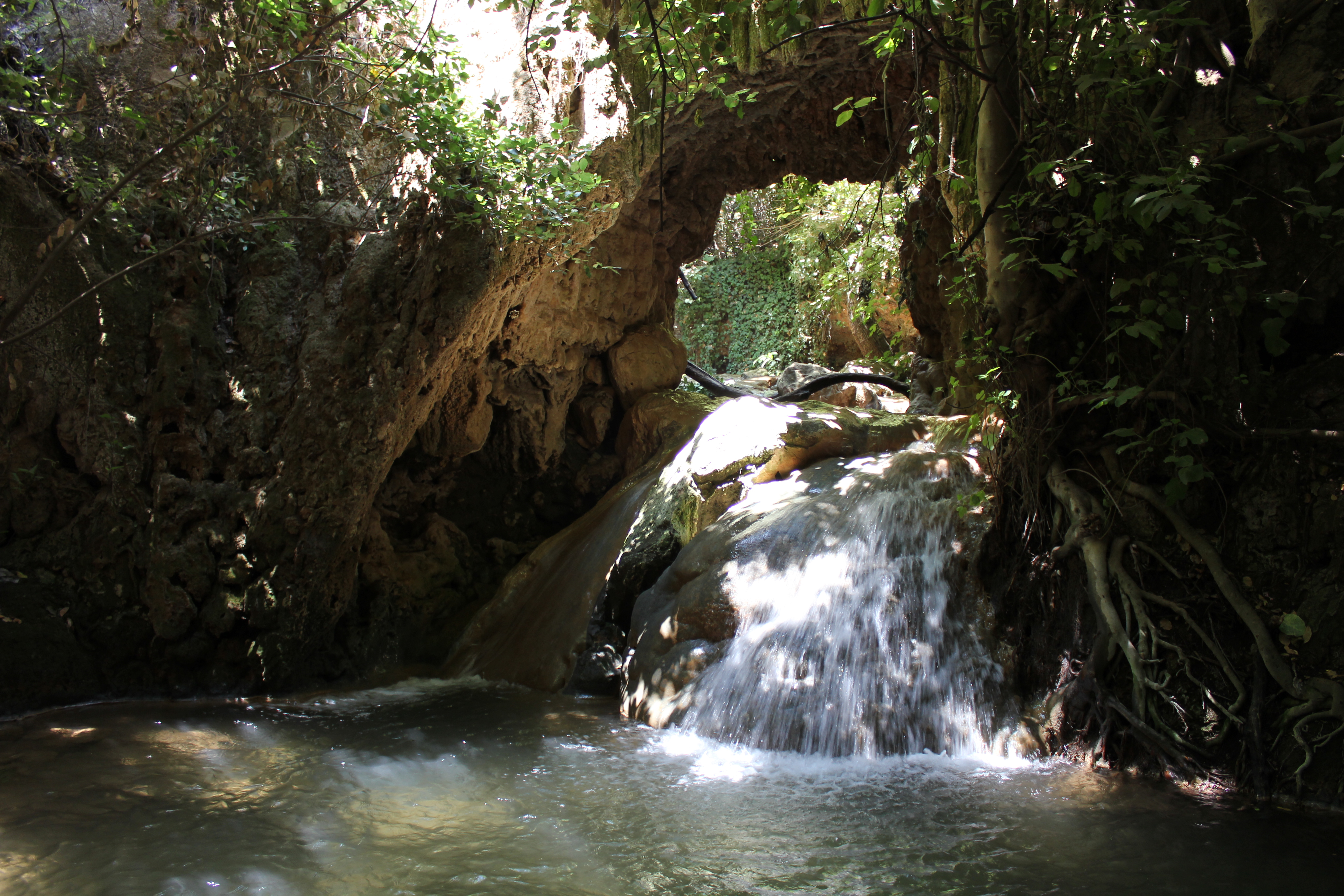 Nahal Amud, Israel Nahal Amud